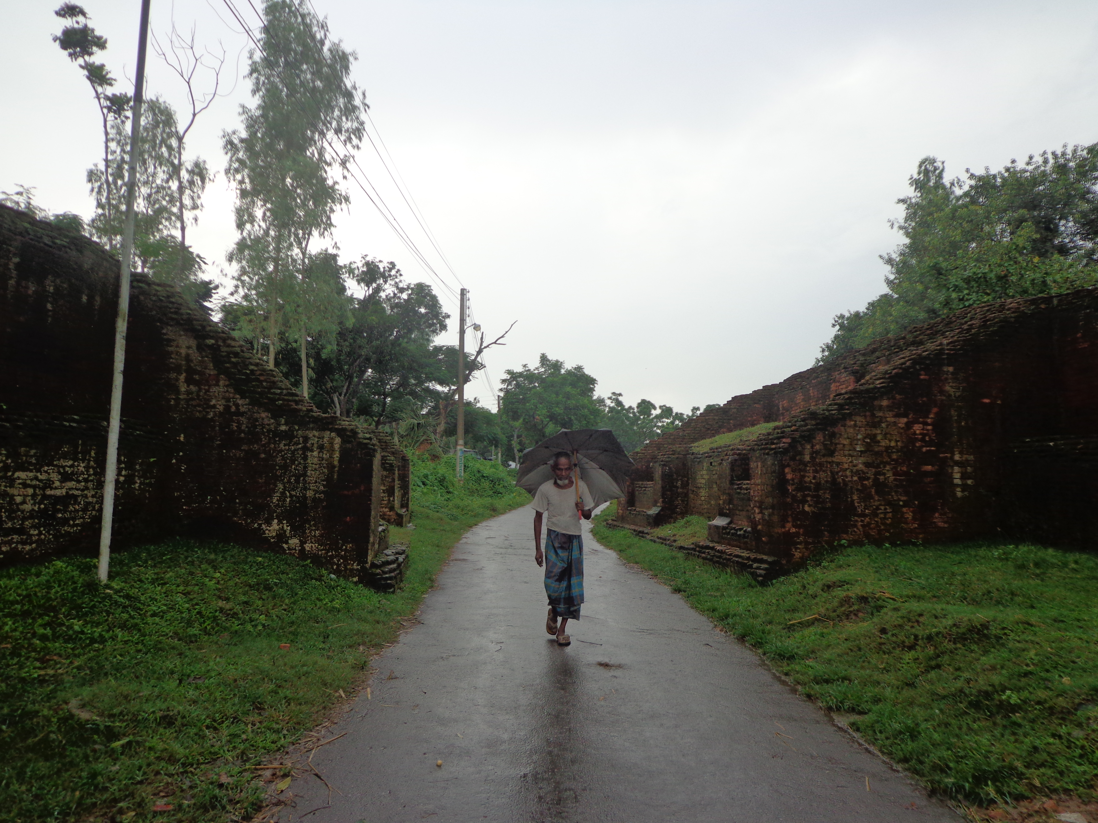 Entrance of Mahasthangarh